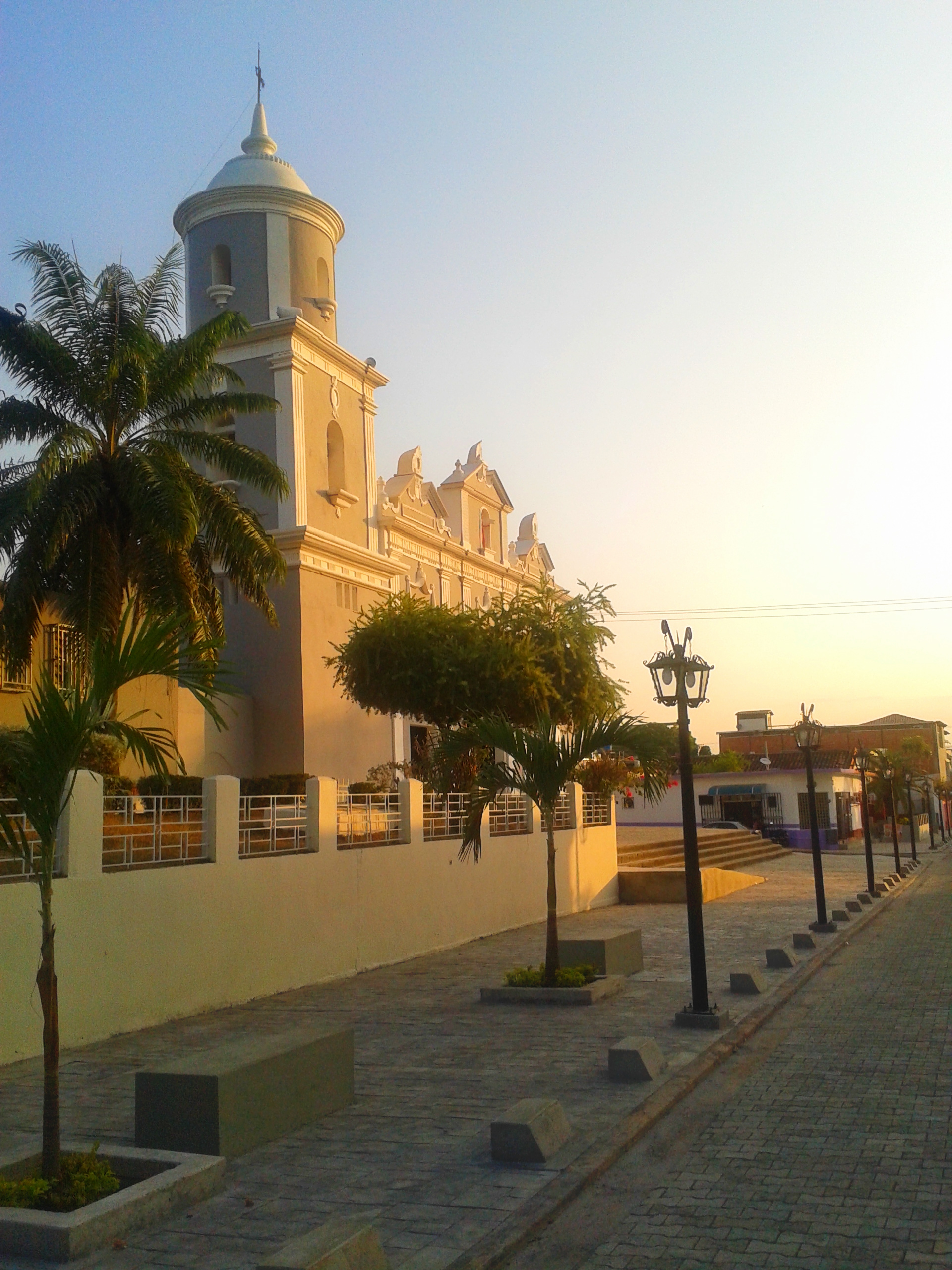 Iglesia San Juan Bautista, San Carlos